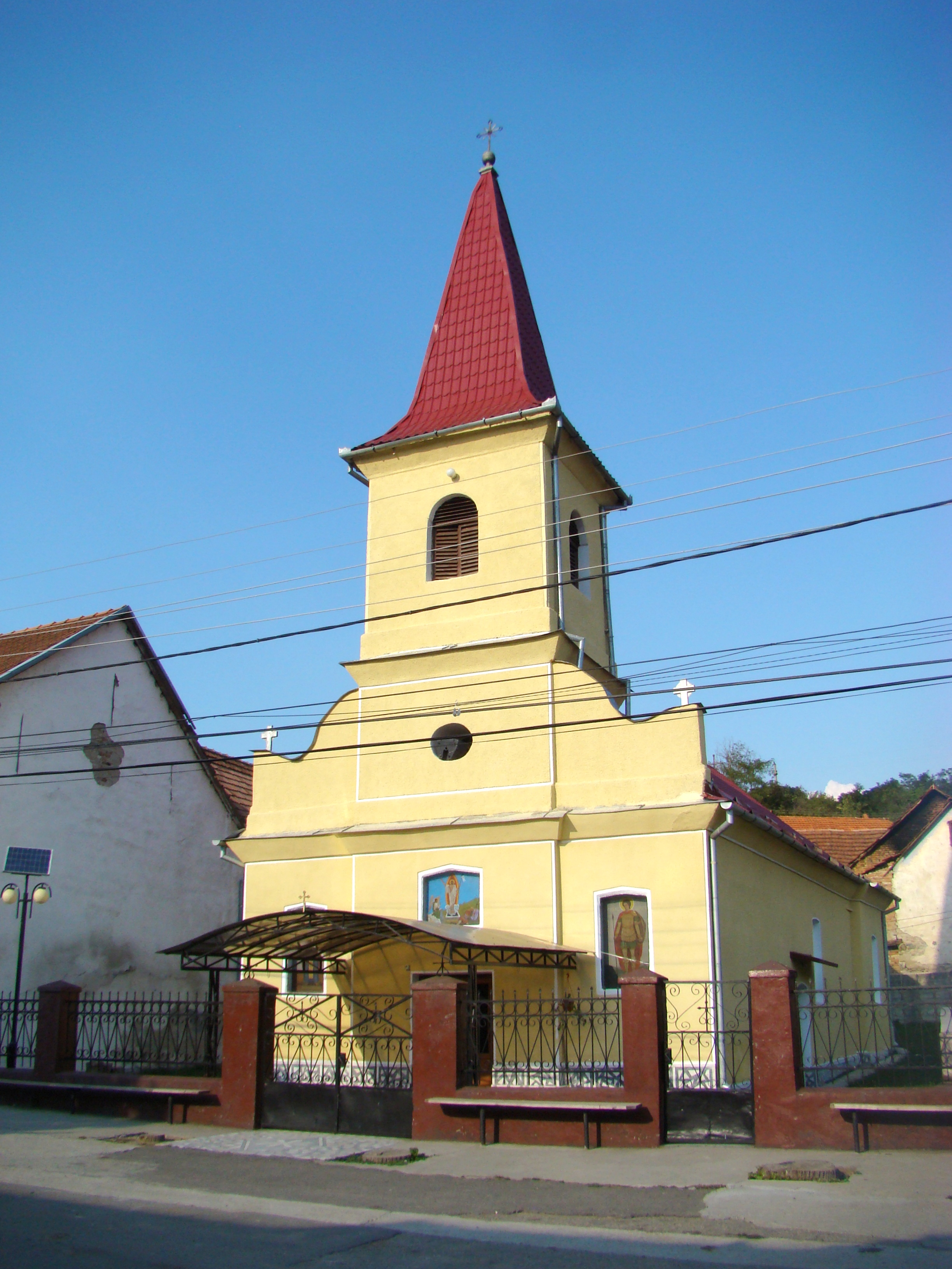 Biserica „Sfântul Nicolae”, sat Globu Craiovei; comuna Iablanița